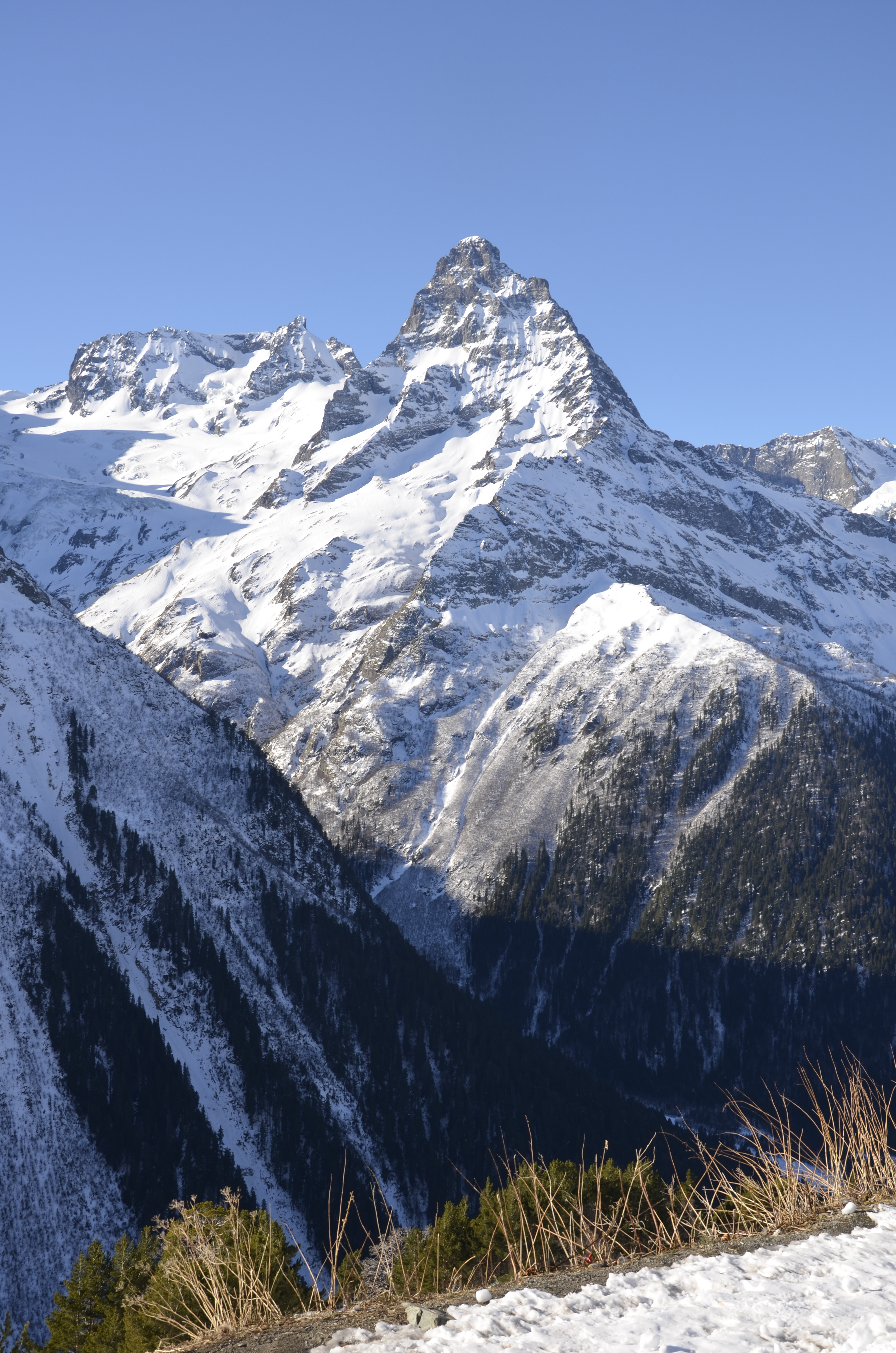 Гора Белалакая, Тебердинский заповедник This image is related to the protected area of Russia number 0900019